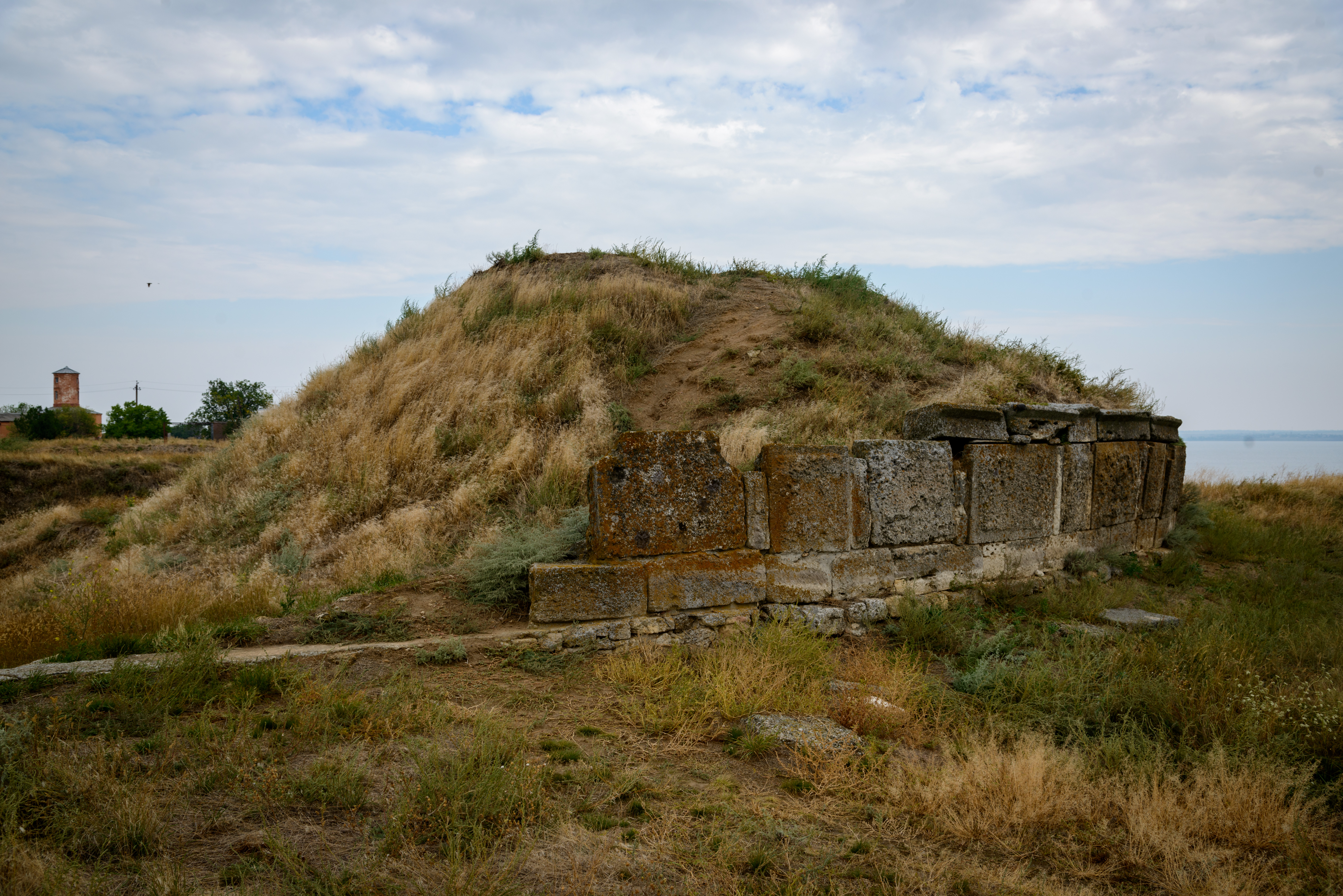 Стародавнє місто Ольвія, Парутине, вул. Ольвійська, 47а